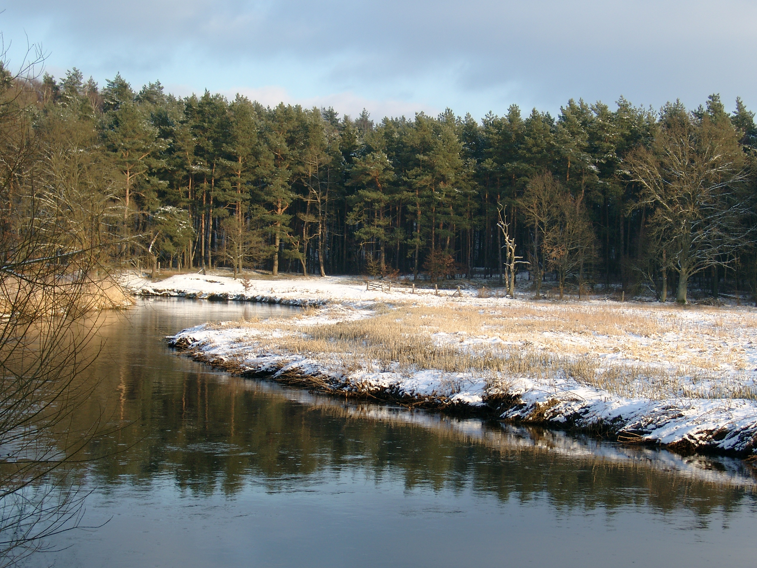 Ilmenautal südlich von Lüneburg (bei Melbeck), Naturschutzgebiet Lüneburger Ilmenauniederung mit Tiergarten